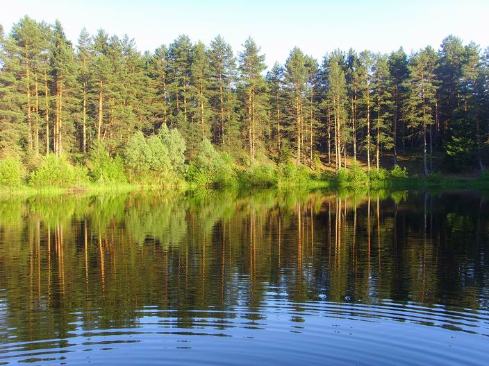 Озеро Рязаново